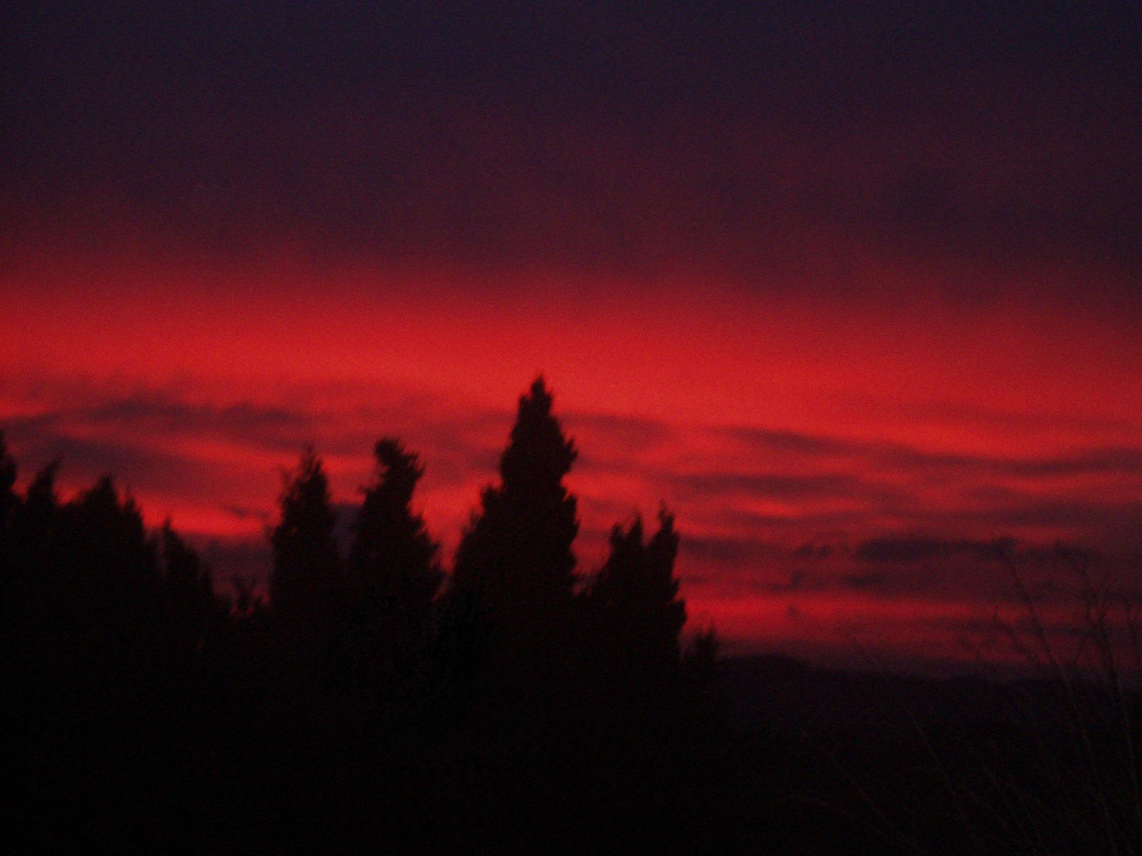 Posta de sol vista des d'un camp dels afores de Palafrugell. Al fons es veuen uns xiprers.